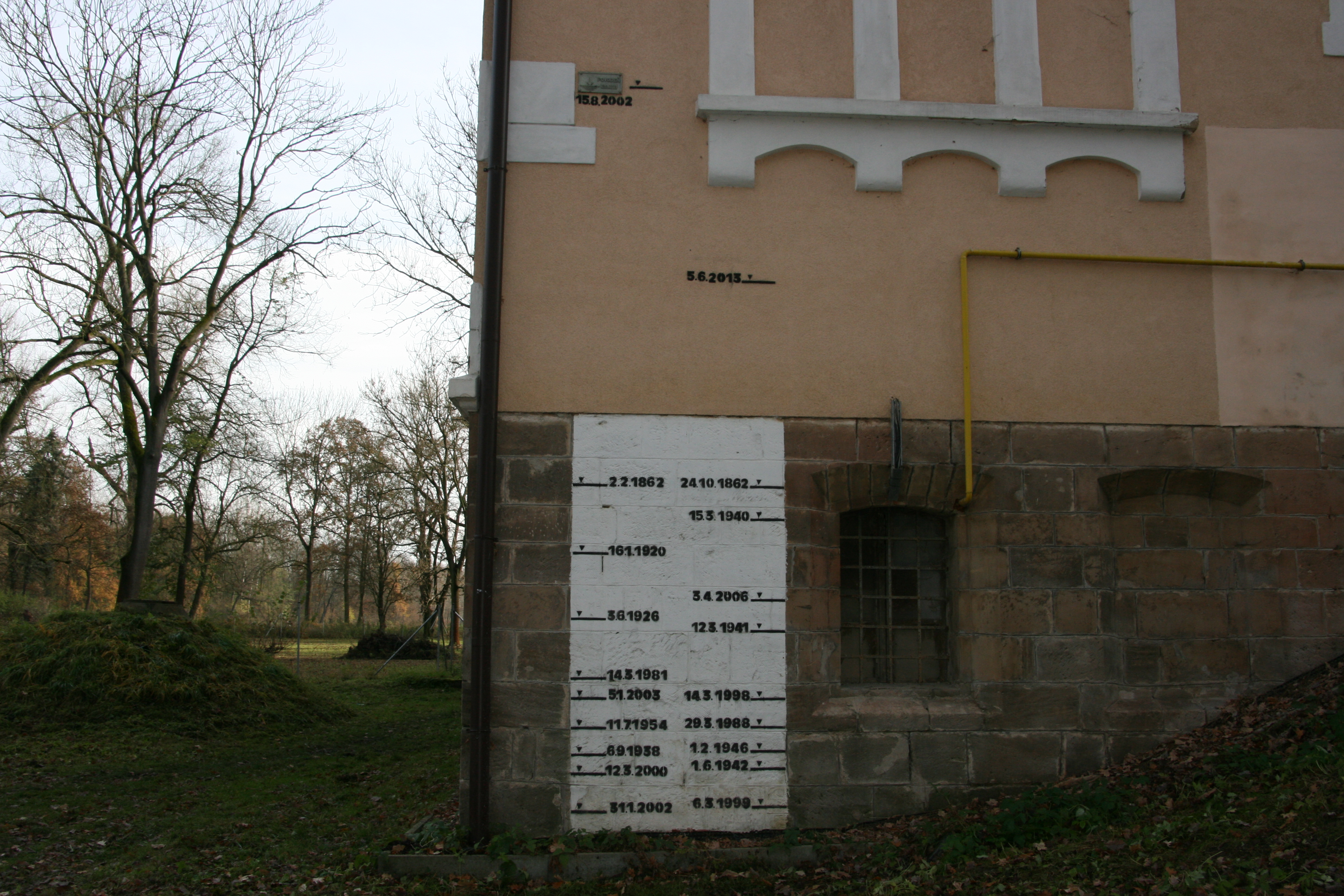 Záznamy o výšce vody při povodních v Obříství